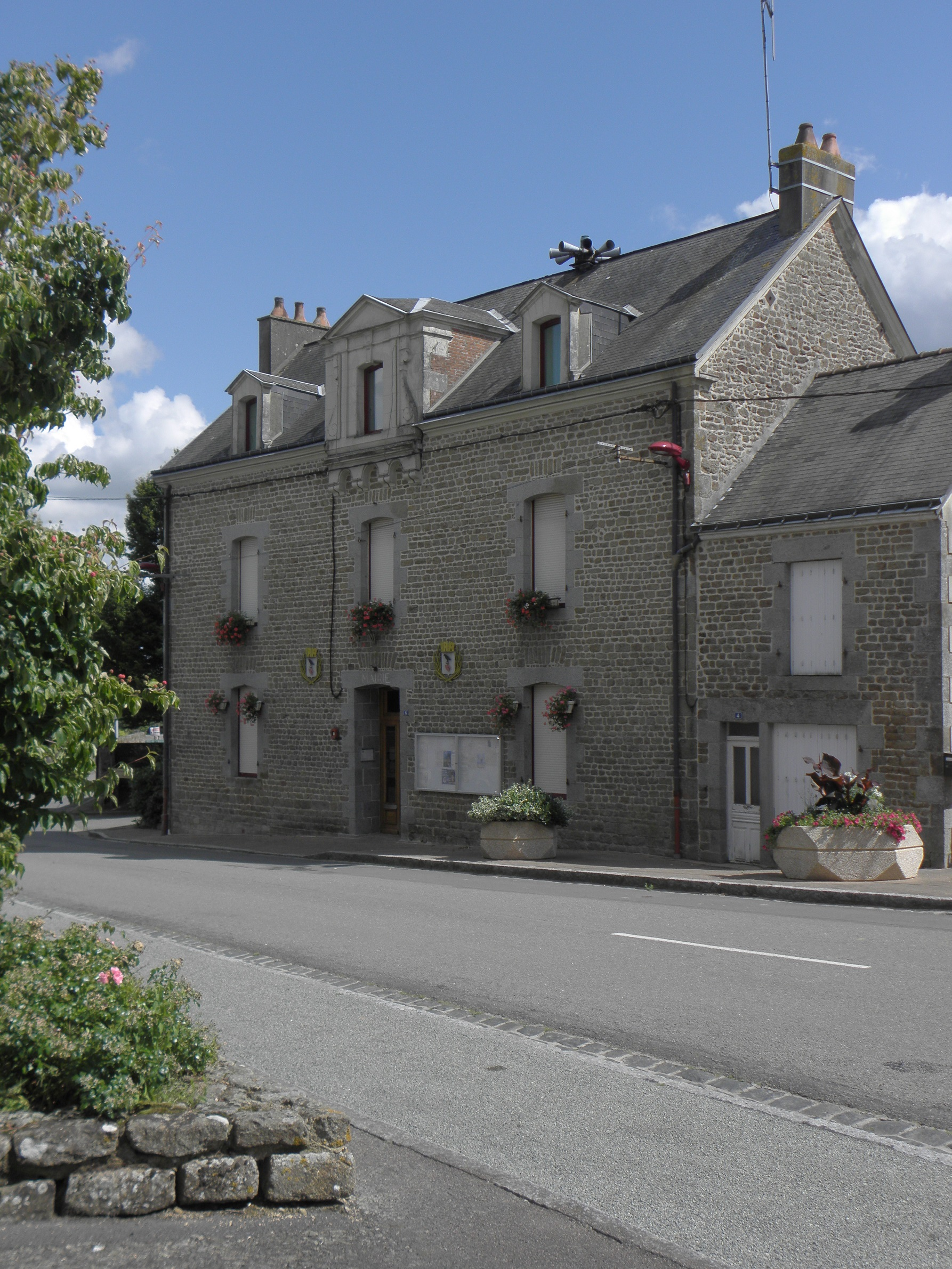 Mairie de Larchamp (53).